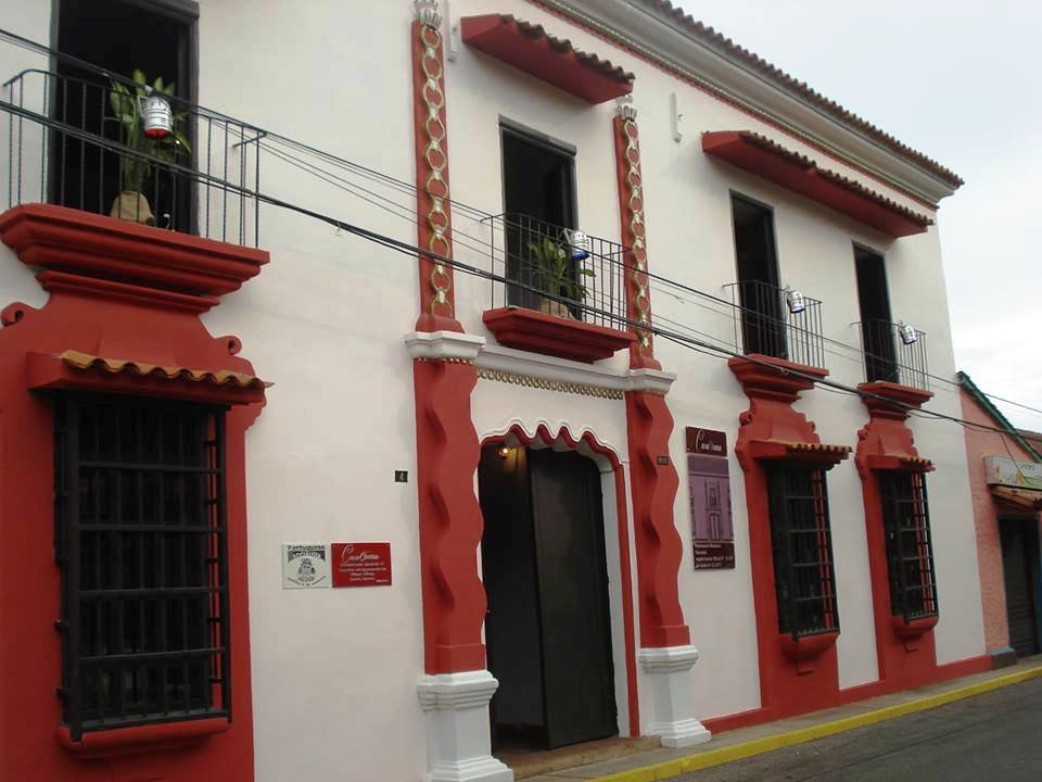 Casa Coima Construcción colonial que data del siglo XVIII. En su comienzo fué sede de la Compañía Guipuzcoana y posteriormente sede de los Reales Estancos del Tabaco. Luego, en 1914, fue transformada en casa presidencial por el general gomecista Pérez Soto. Su nombre conmemora la aventura en la Laguna de Casacoima en la cual tomó parte el Libertador.